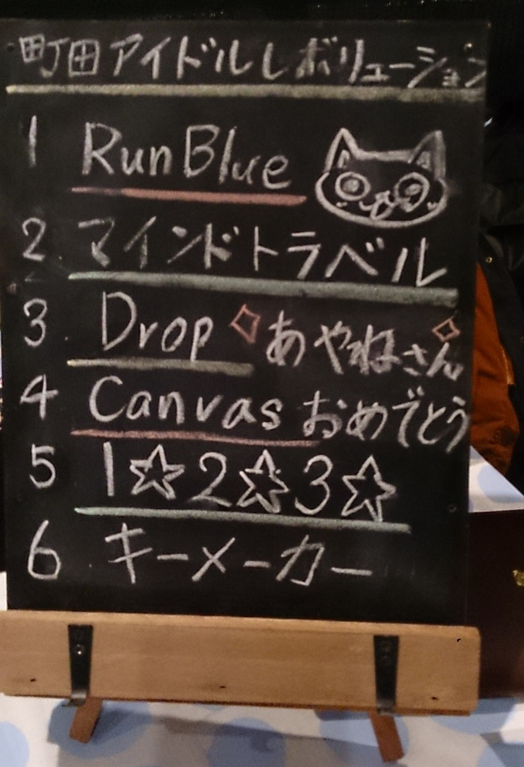 amiinaセトリボード(20150125(2)